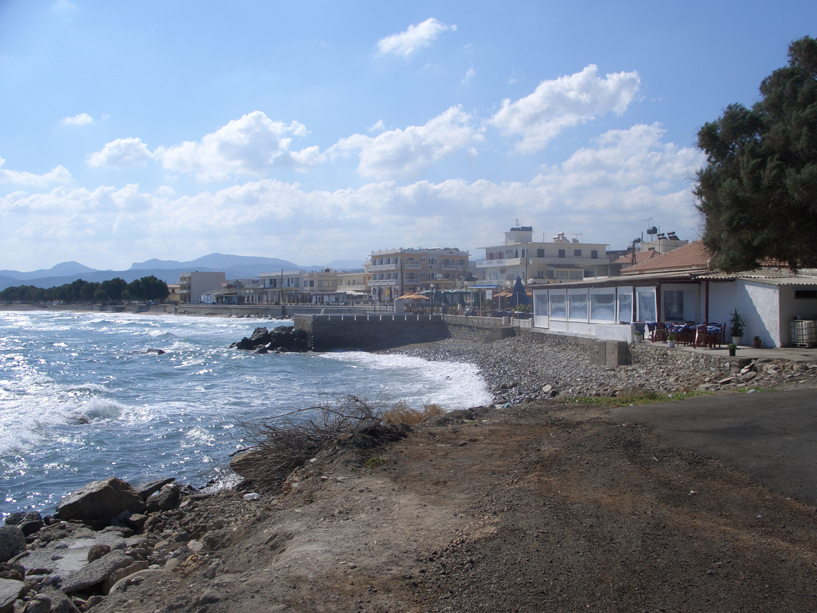 El litoral de Kastelli-Kissamou.